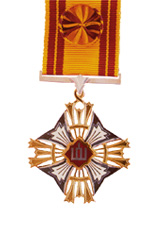 Ordinas. Ordinas.